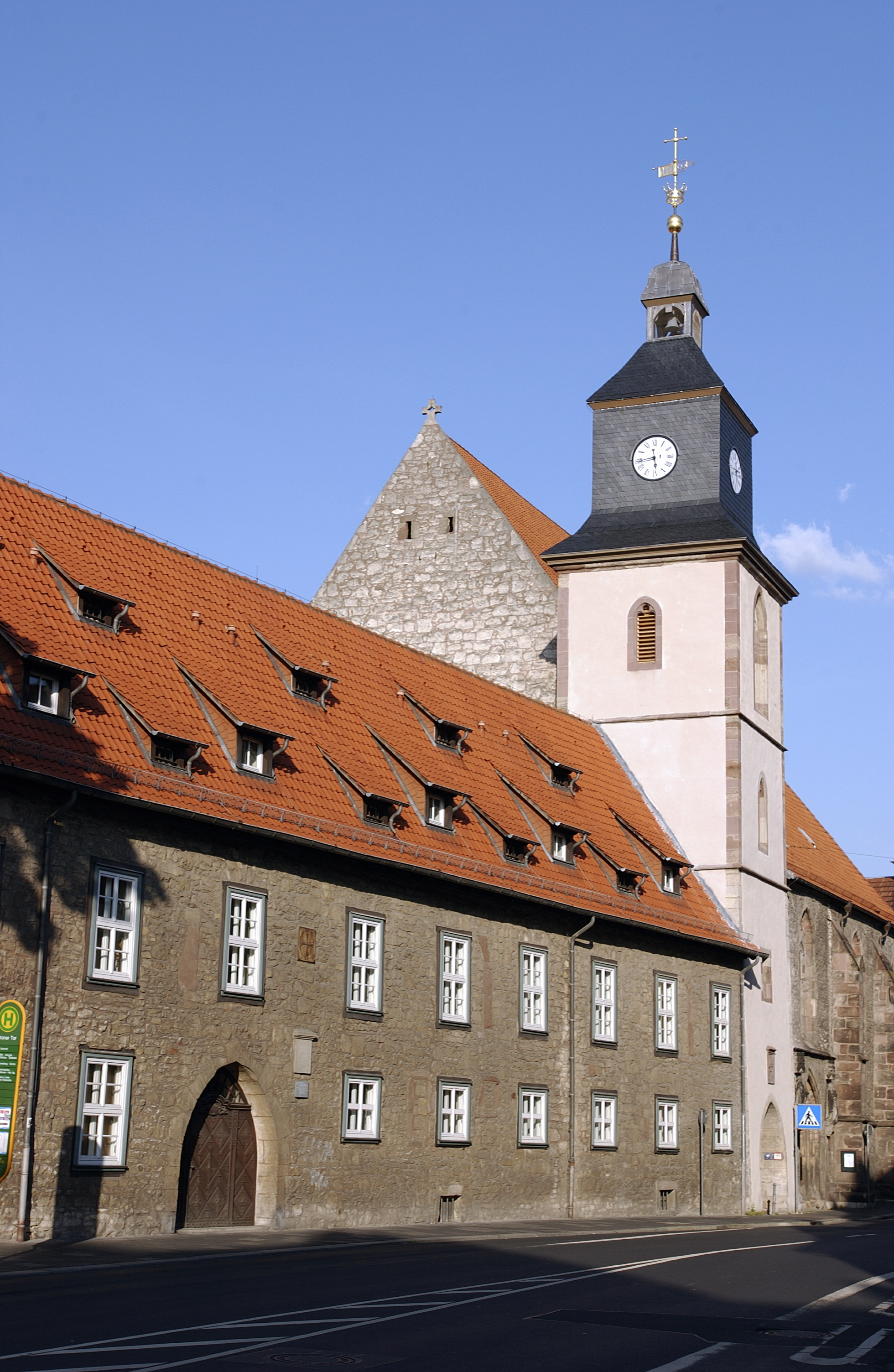 Goettingen, Marienkirche